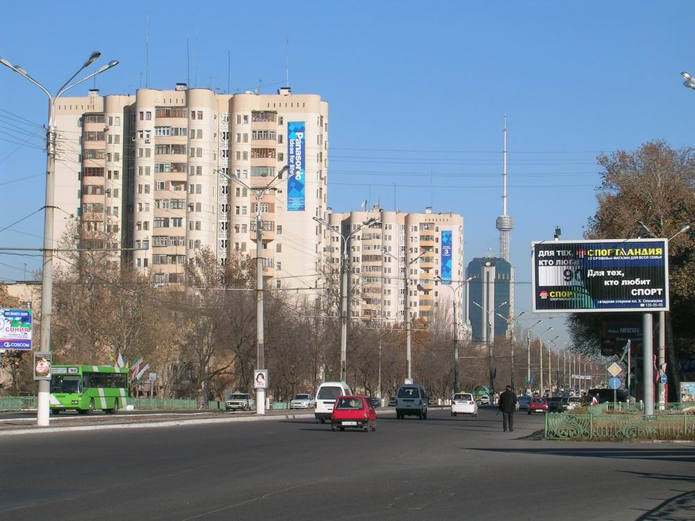 Tashkent, Uzbekistan Amir Timur street